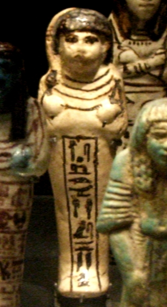 Oushebti du grand prêtre de Ptah Houy - Règne de Ramsès II - XXe dynastie égyptienne - Musée du Louvre